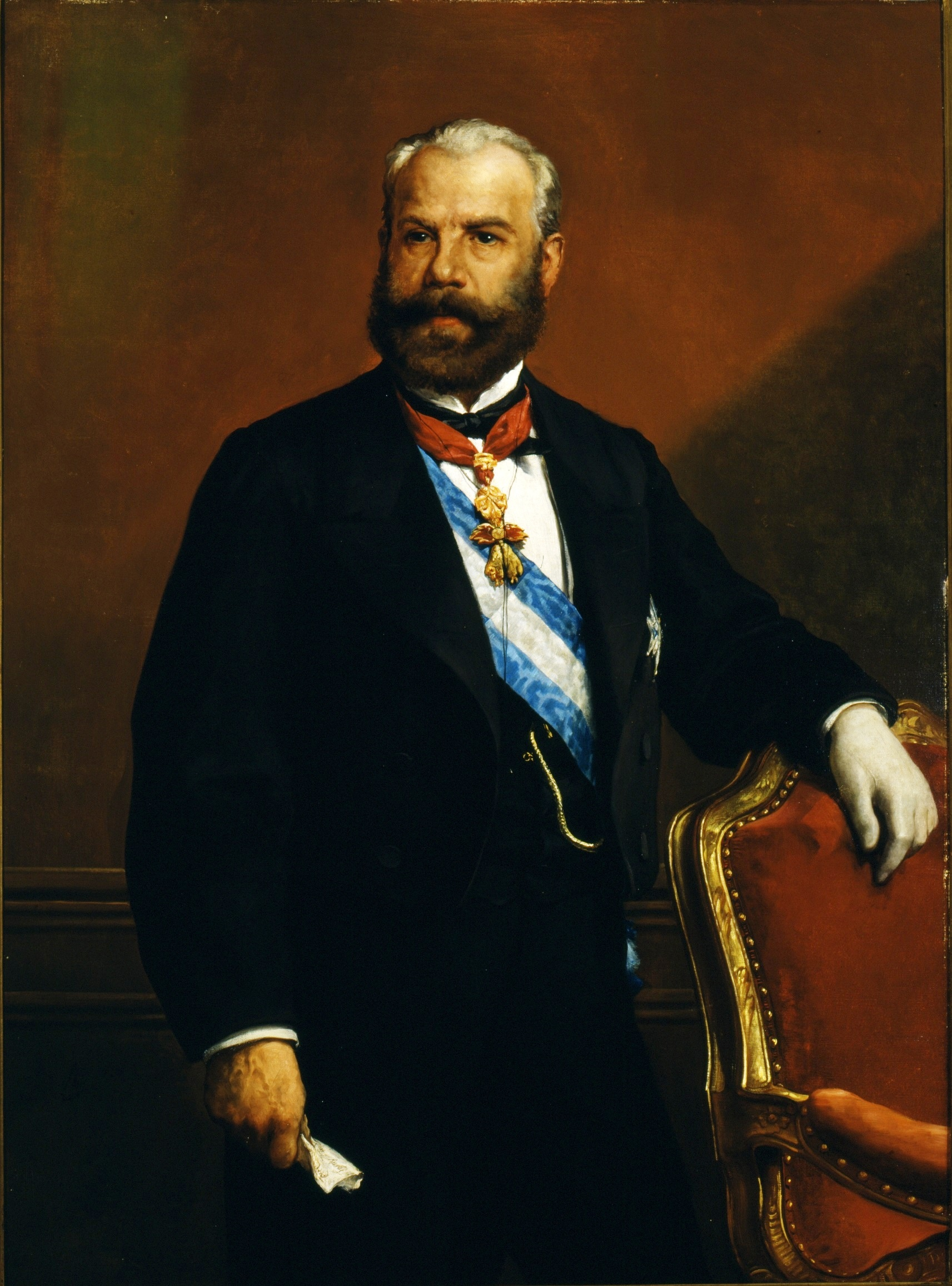 Retrato del político y jurista español Antonio de los Ríos Rosas (1812-1873).